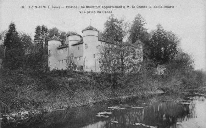 Chateau de Montfort - Eyzin-Pinet, Isère, Rhône-Alpes, France.